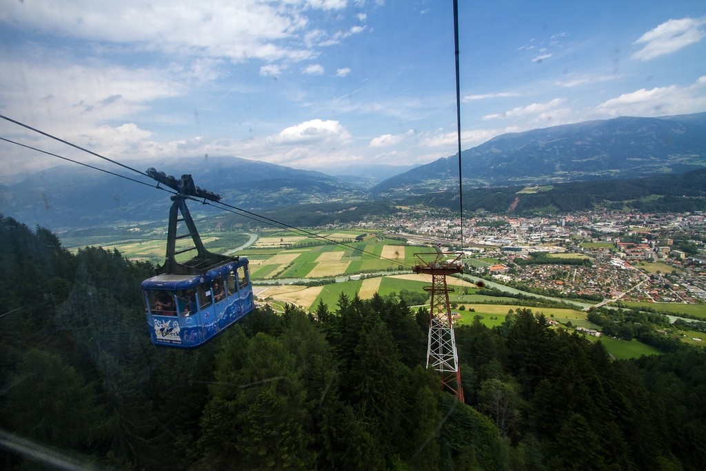 Talfahrt mit der Goldeck-Bahn nach Spittal an der Drau